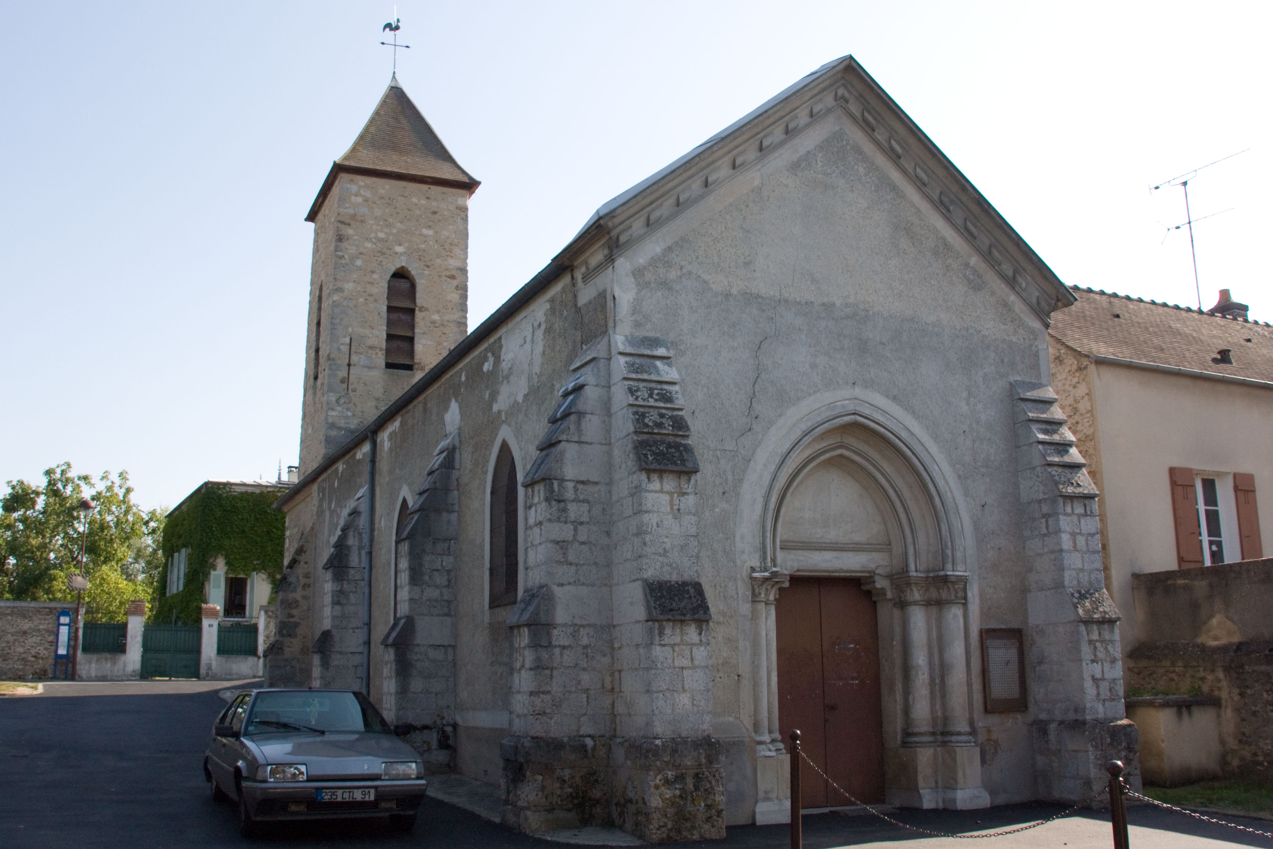 Eglise d'Ormoy, Ormoy, Essonne, France